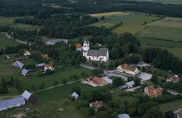 Motiv: Burs kyrka Nyckelord: Flygbilder, Riksintressen Kategori: Kyrkby Burs kyrka